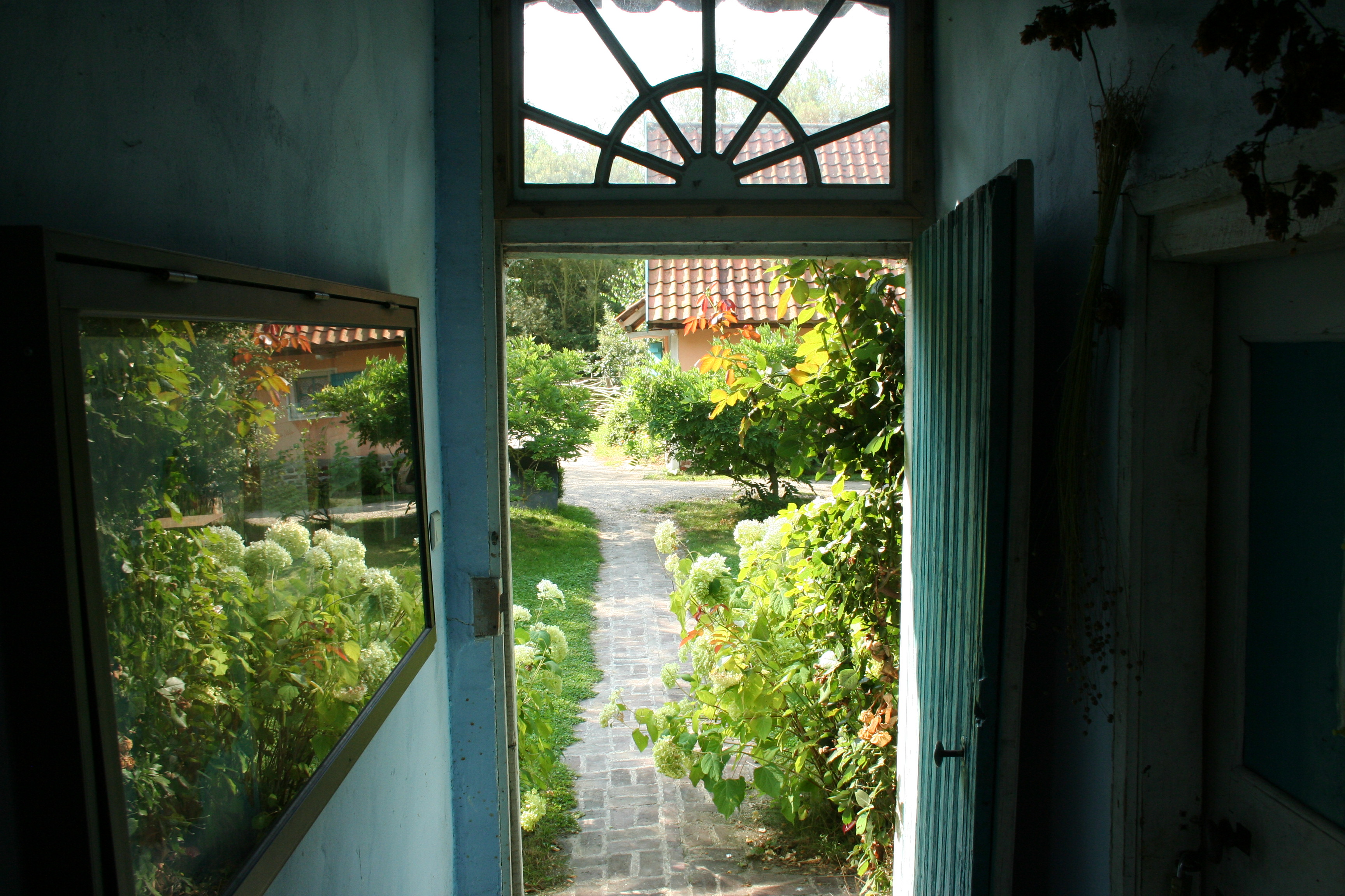 Musée de Plein Air, Villeneuve d'Ascq, France